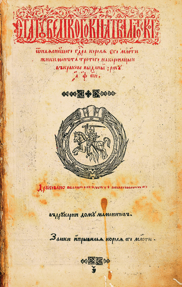 Беларуская (тарашкевіца): Тытульны аркуш Трэцяга Статуту Вялікага Княства Літоўскага